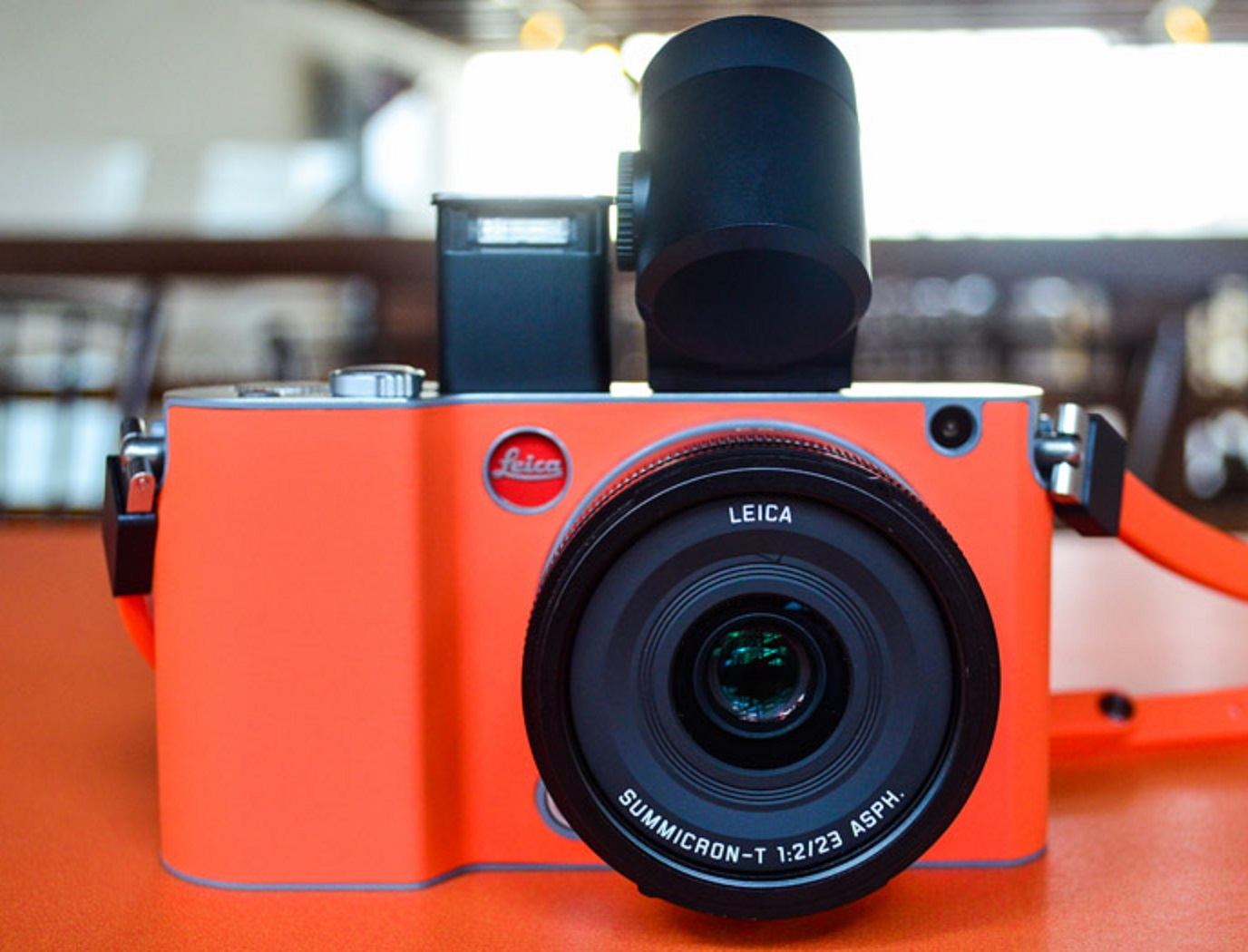 Le Leica T 701, premier appareil hybride de Leica.